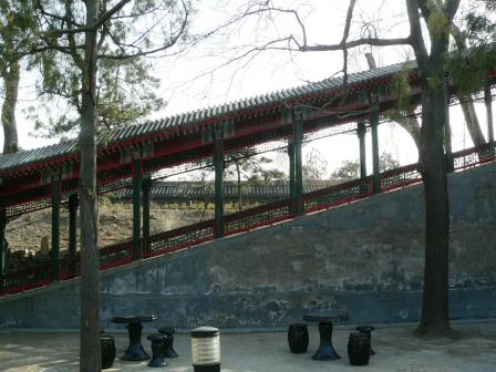 爬山廊 用心阁于2005年3月29日拍摄于宋庆龄故居